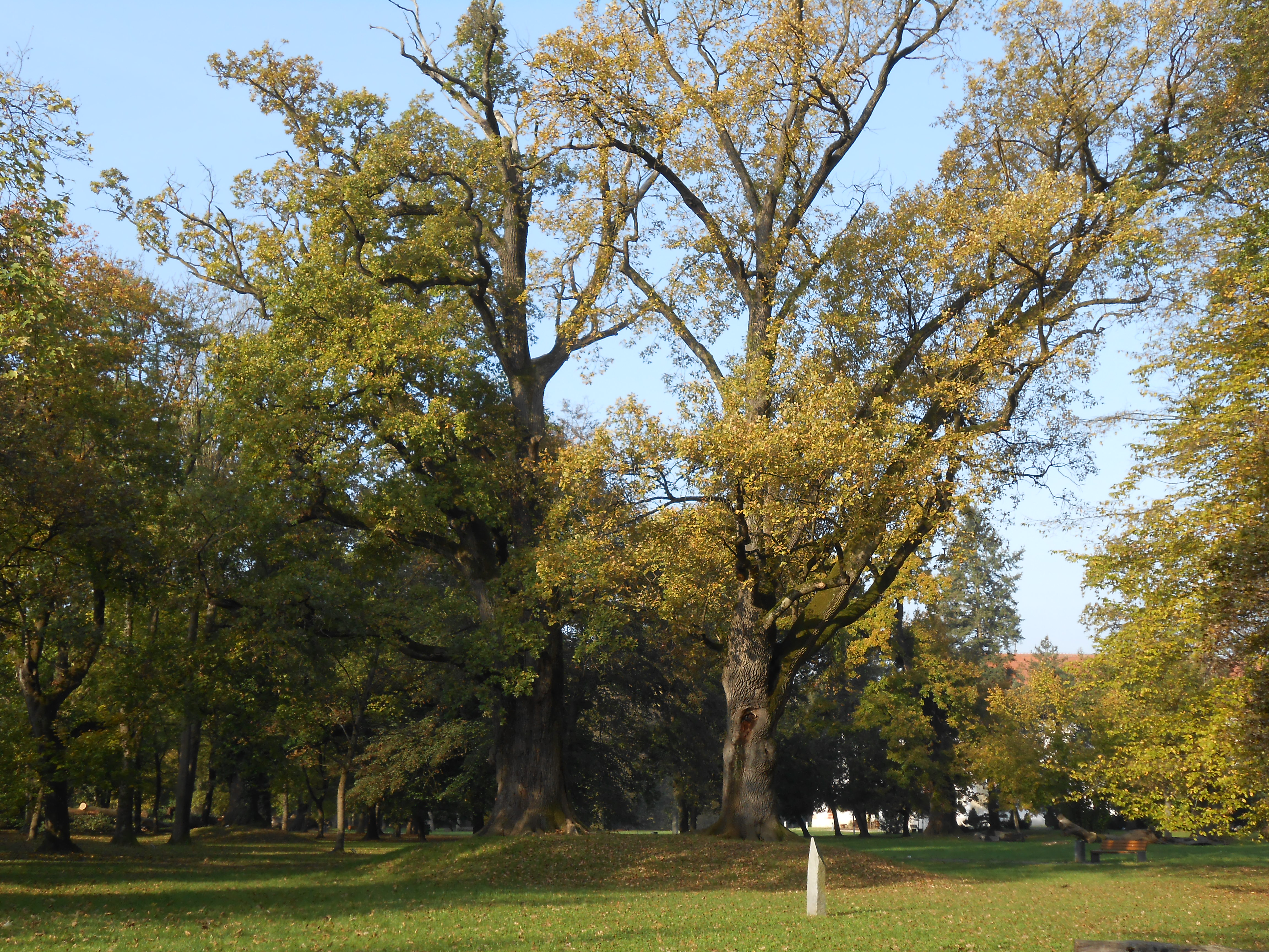 Hraste so včasih sadili na vzpetinice, kar je drevesom dajalo mogočnejši videz.